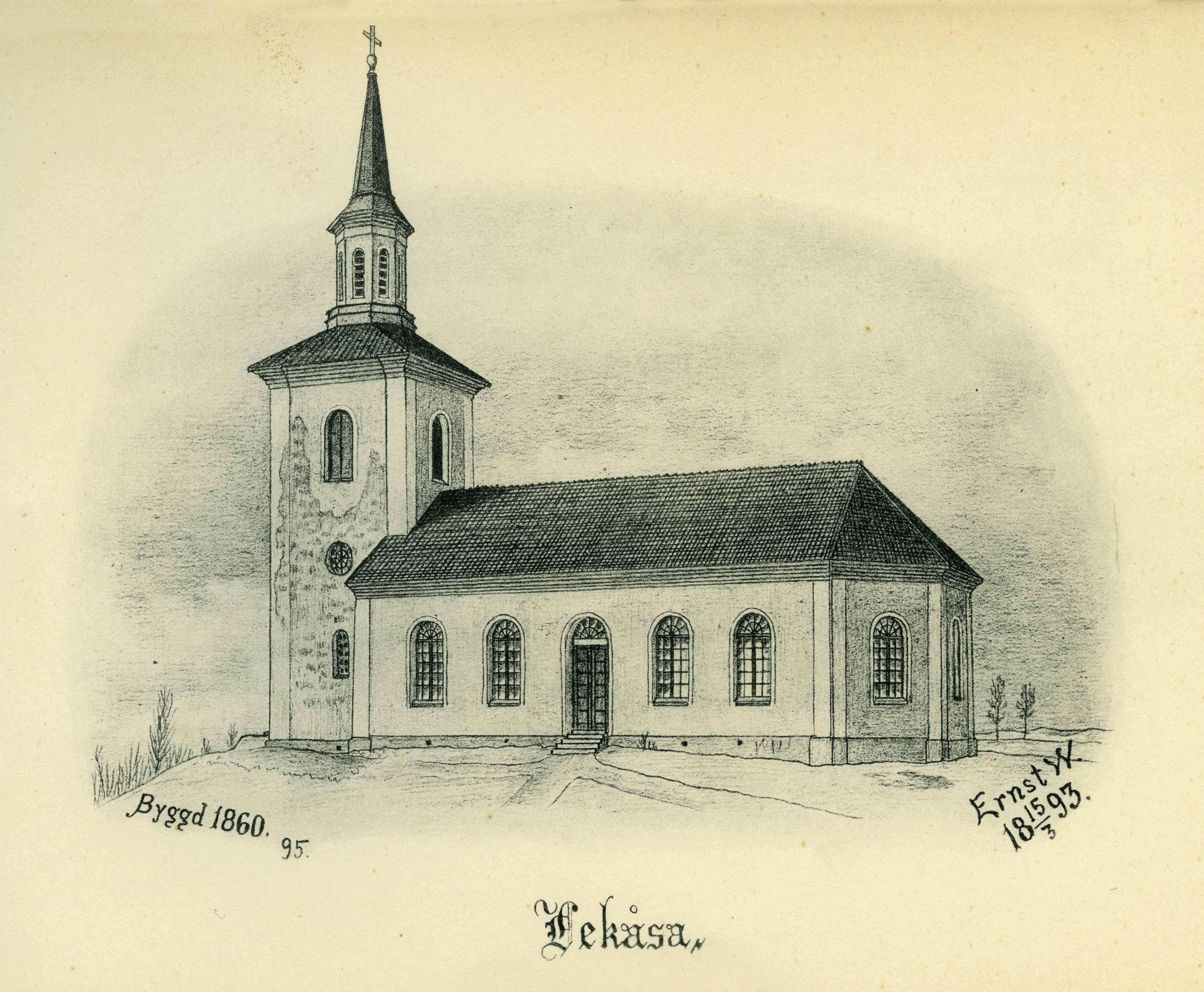 Lekåsa kyrka år 1893 i Barne härad, Skara stift, Västergötland, Sverige. Teckning av Ernst Wennerblad ur Skara stifts kyrkor (1902).